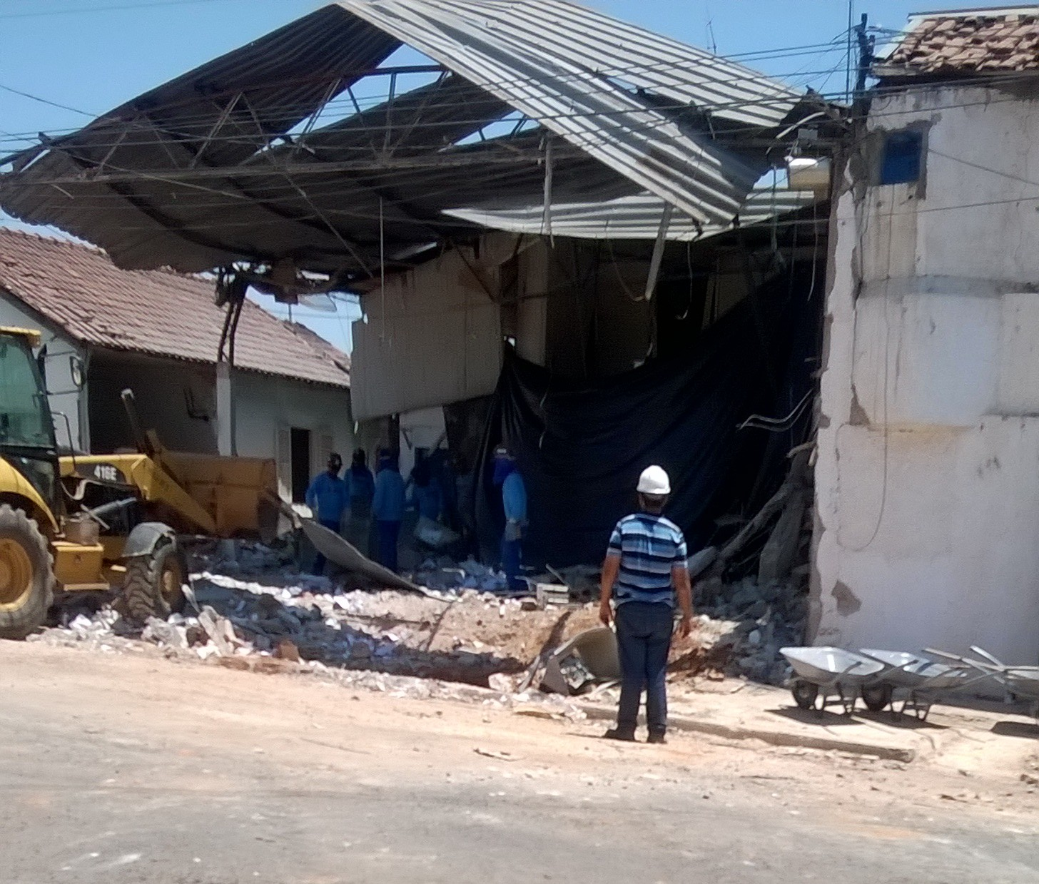 Empresa de transporte de Valores Protege em Araçatuba após assalto. Pedreiros removem o entulho.